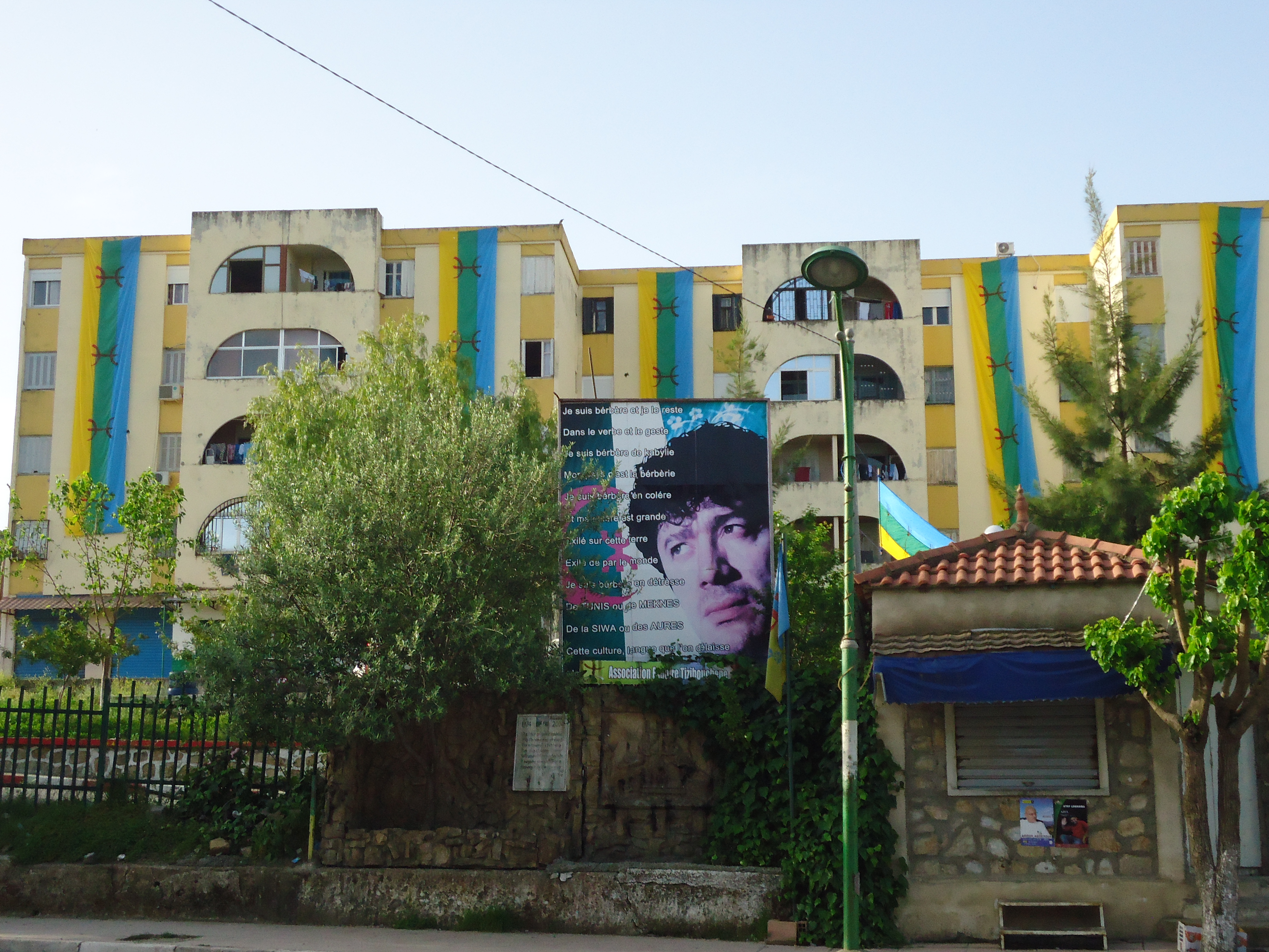 Taqbaylit: Tizi Bouchene célébration du printemps berbère du 36eme printemps berbère !